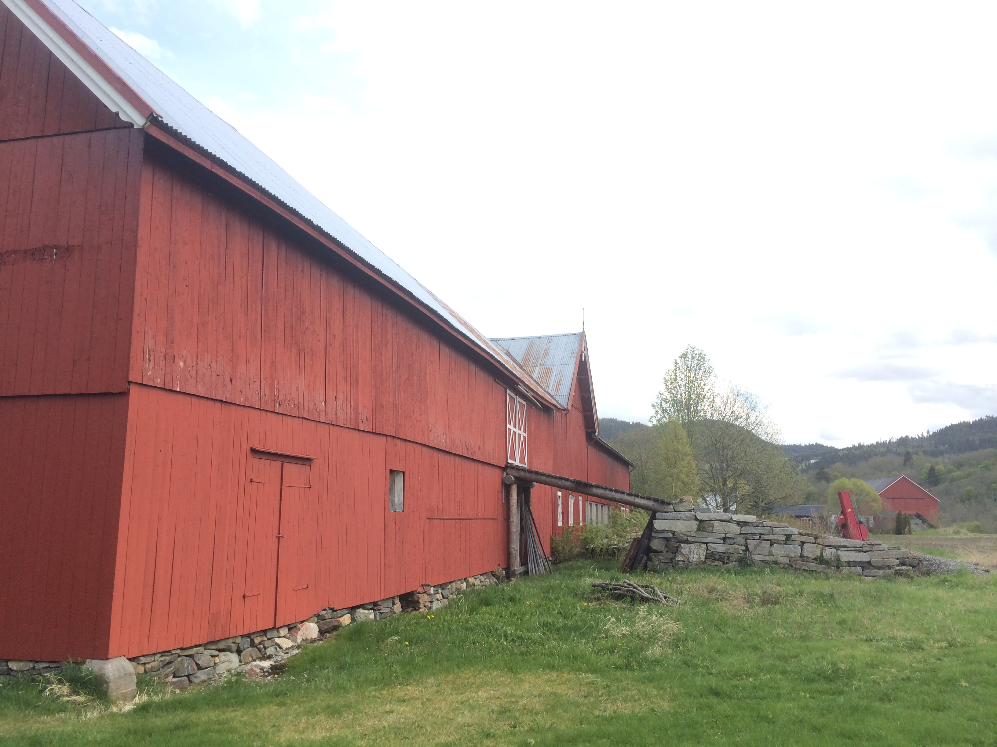 Sørveggen av driftsbygningen på Gjesvål, Orkdal kommune